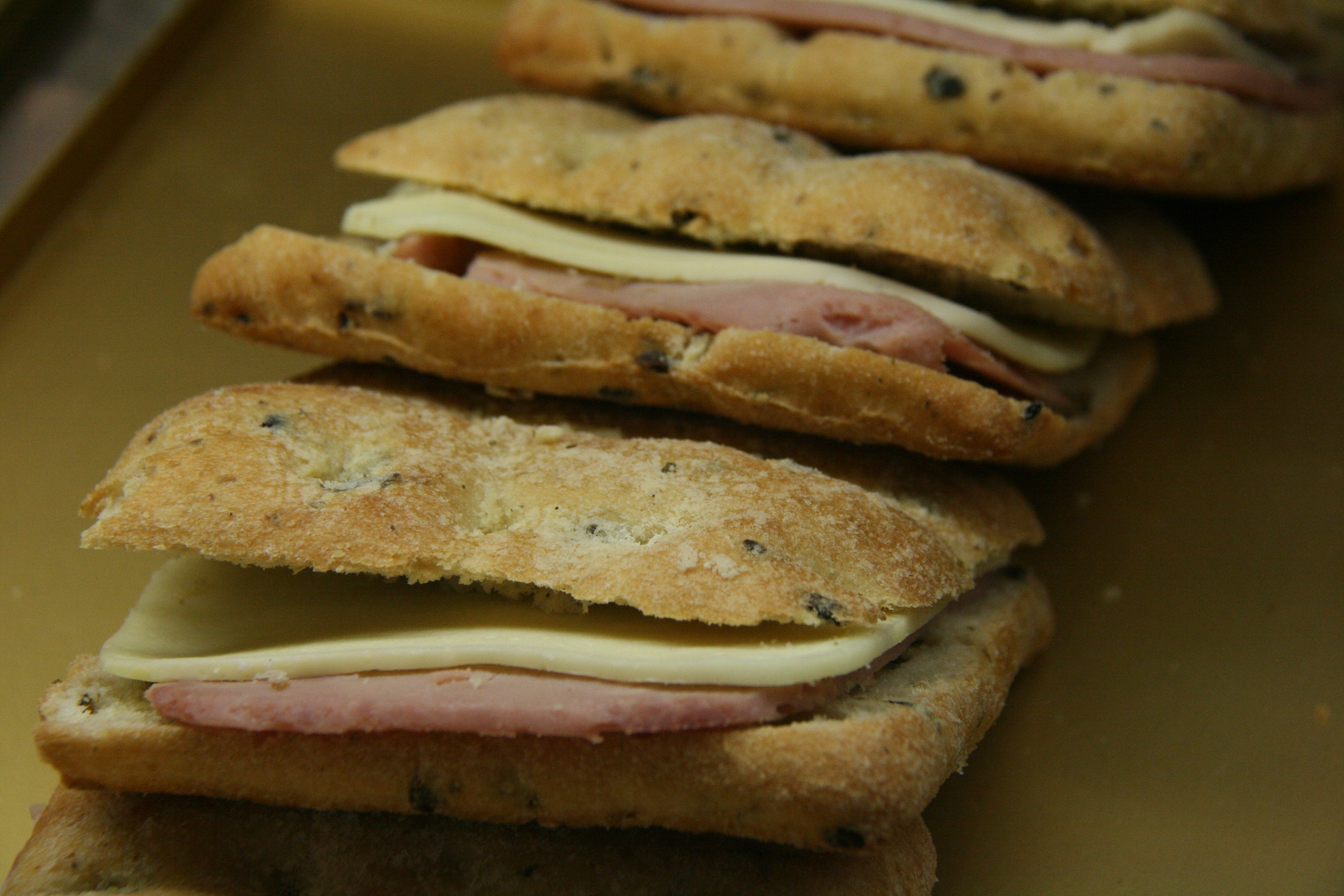 Sandwich mixto crudo - preparado